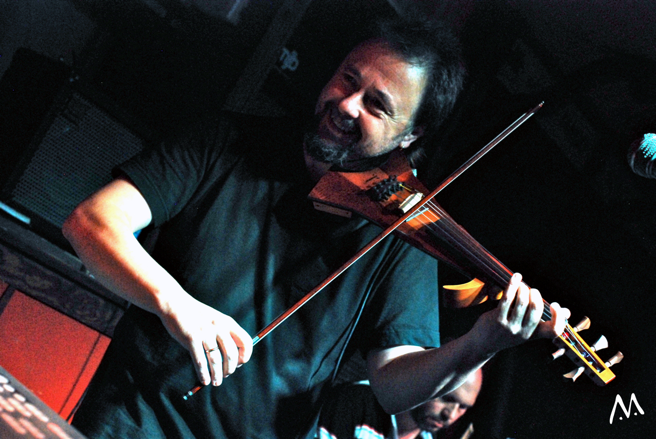 fotografía de Sergio Poli